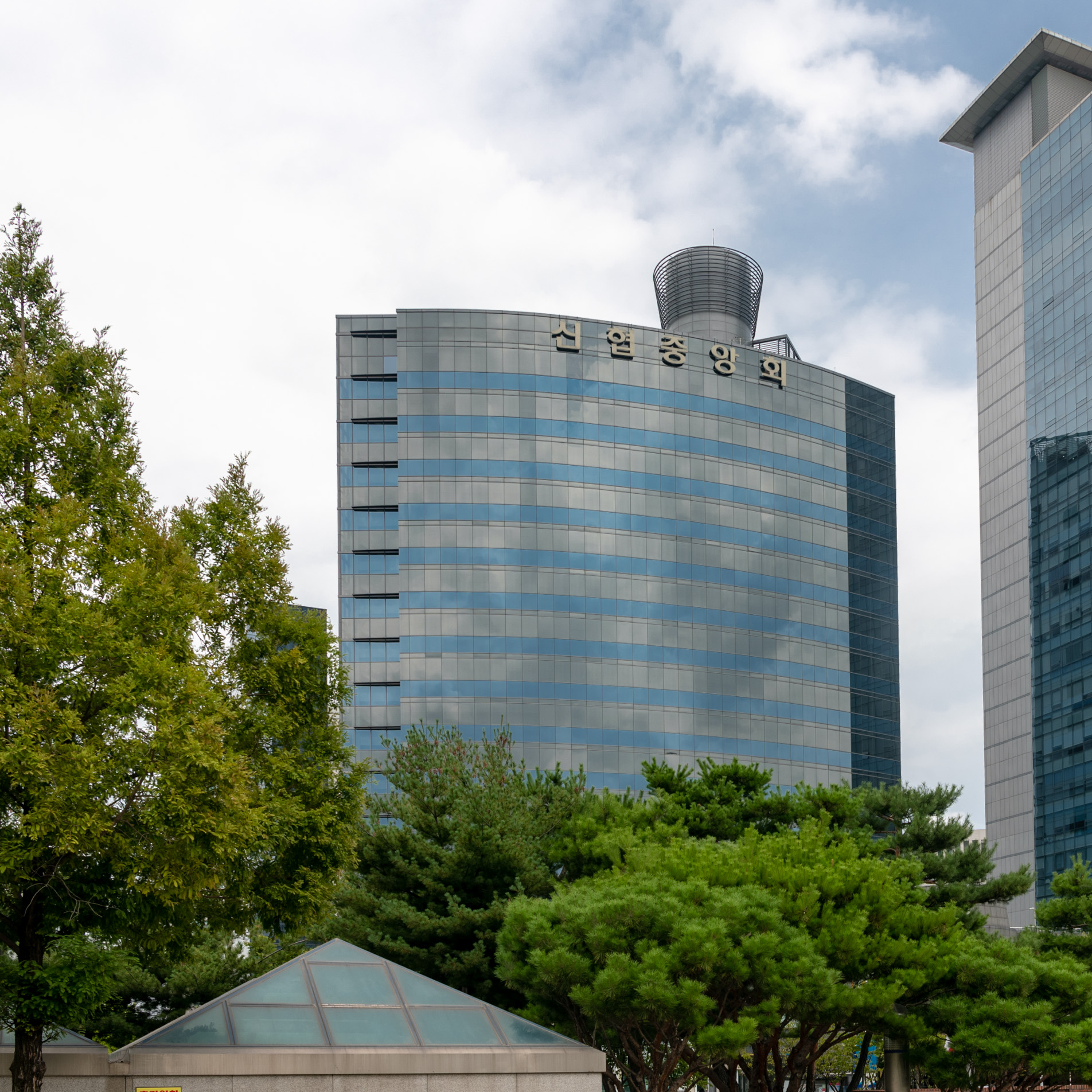 대전시 신협 중앙회